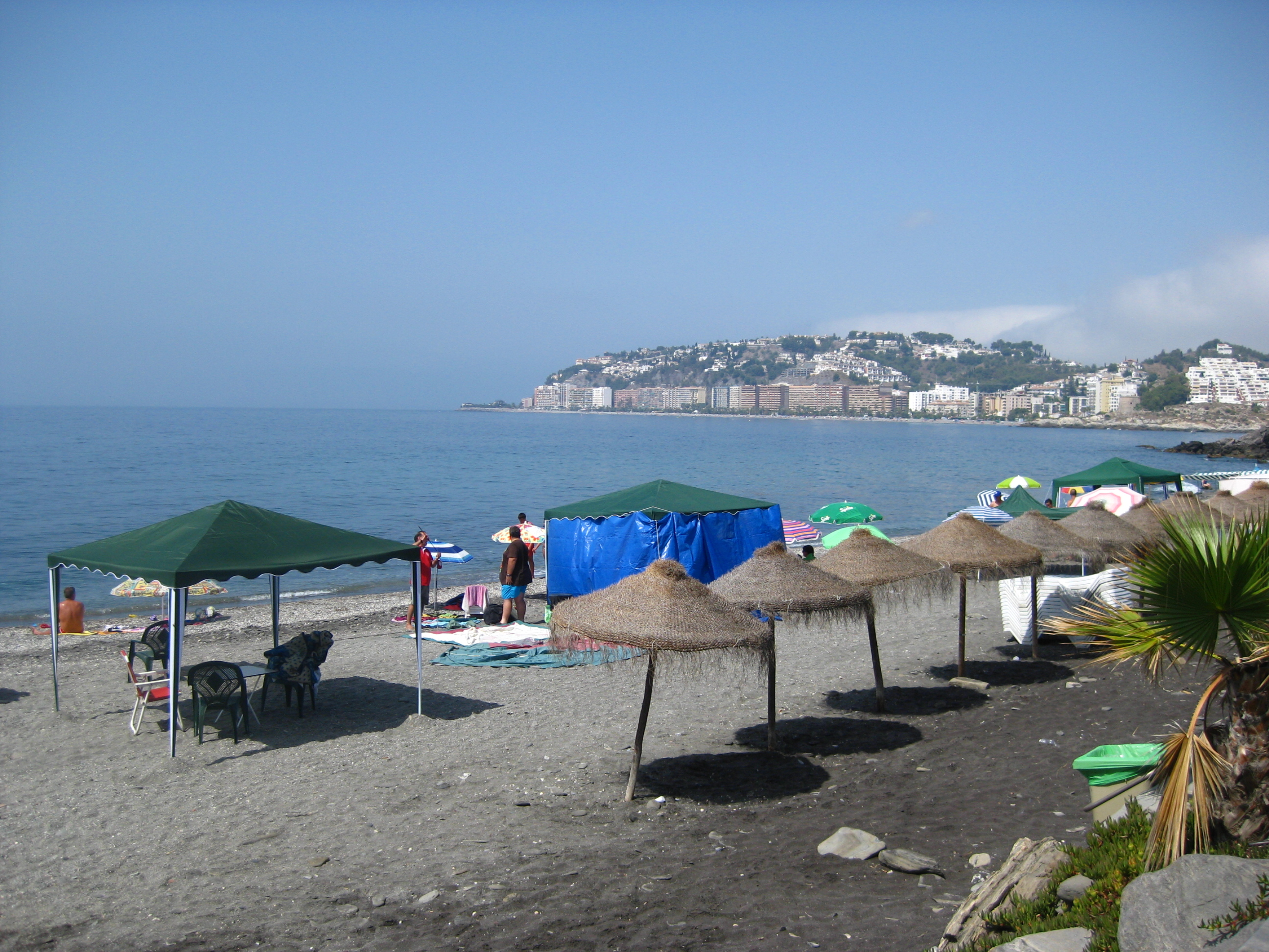 Playa Cabria